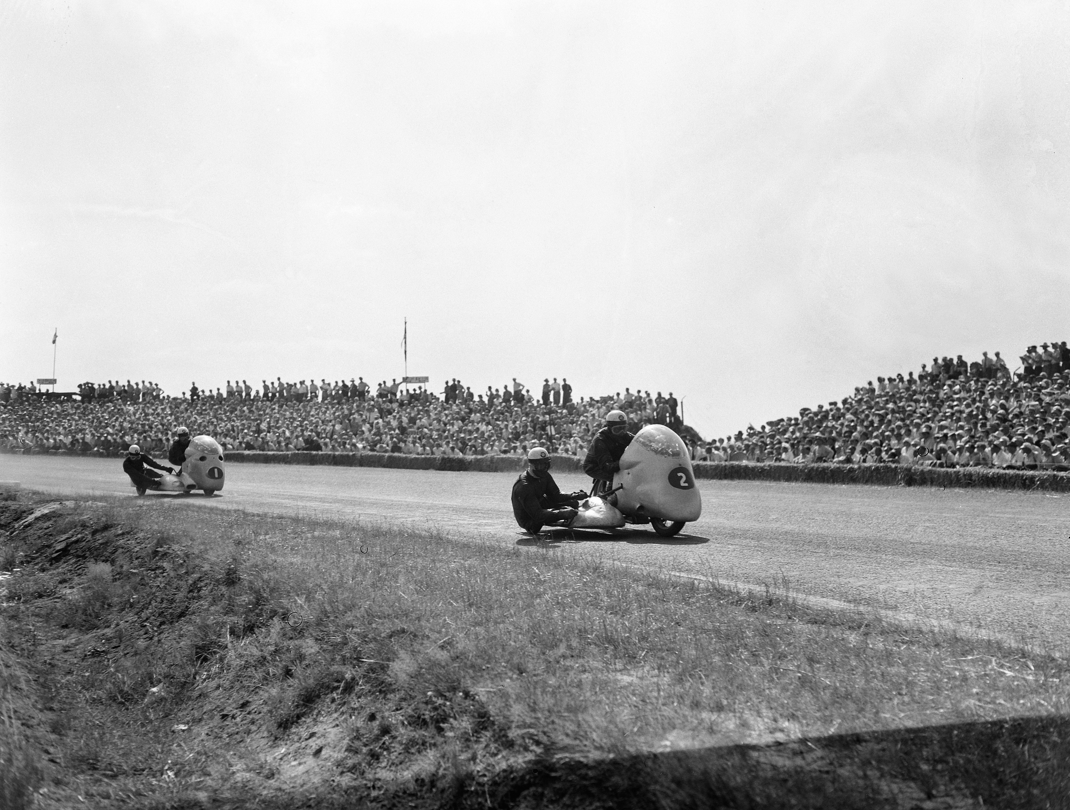 Collectie / Archief : Fotocollectie Anefo Reportage / Serie : TT Assen 1955 Beschrijving : Zijspannen. Wilhelm Noll / Fritz Crohn (Duitsland, 2e) Datum : 16 juli 1955 Locatie : Assen Trefwoorden : motorsport Instellingsnaam : TT Fotograaf : Pot, Harry / Anefo Auteursrechthebbende : Nationaal Archief Materiaalsoort : Negatief (zwart/wit) Nummer archiefinventaris : bekijk toegang 2.24.01.04 Bestanddeelnummer : 907-2364